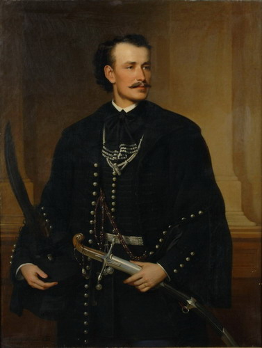 Ürményi Miksa császári és királyi tanácsos és kamarás.